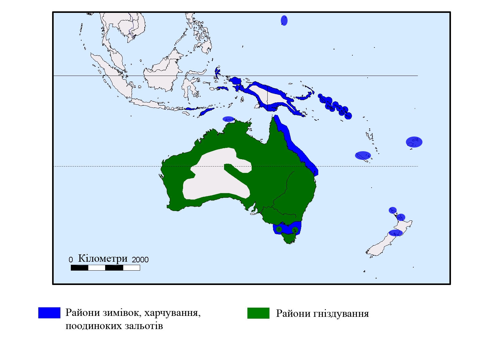 Pelecanus conspicillatus map1.jpg: Розповсюдження австралійського пелікана